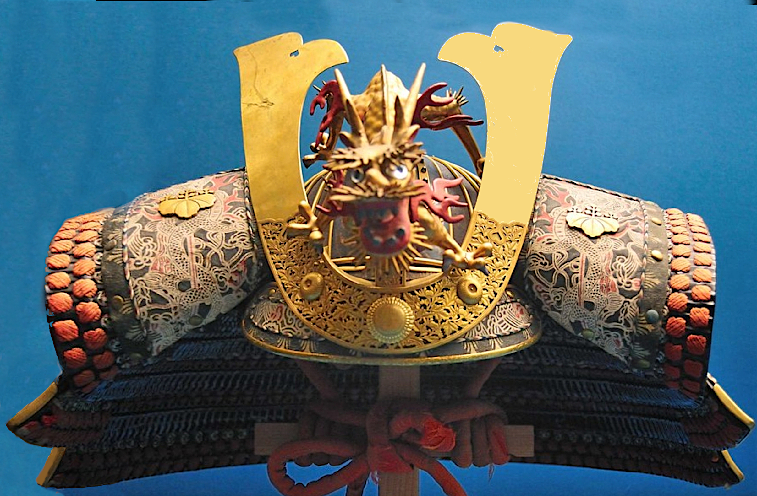 Kabuto (casque) de l' empereur au Musée national de Tokyo au Japon